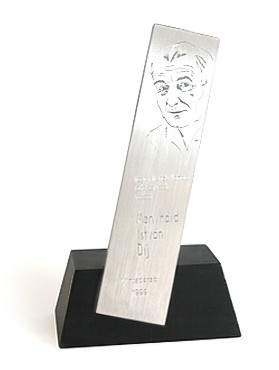 Magyar Mérnöki Kamara Tartószerkezeti Tagozat Menyhárd István-díj kisplasztika